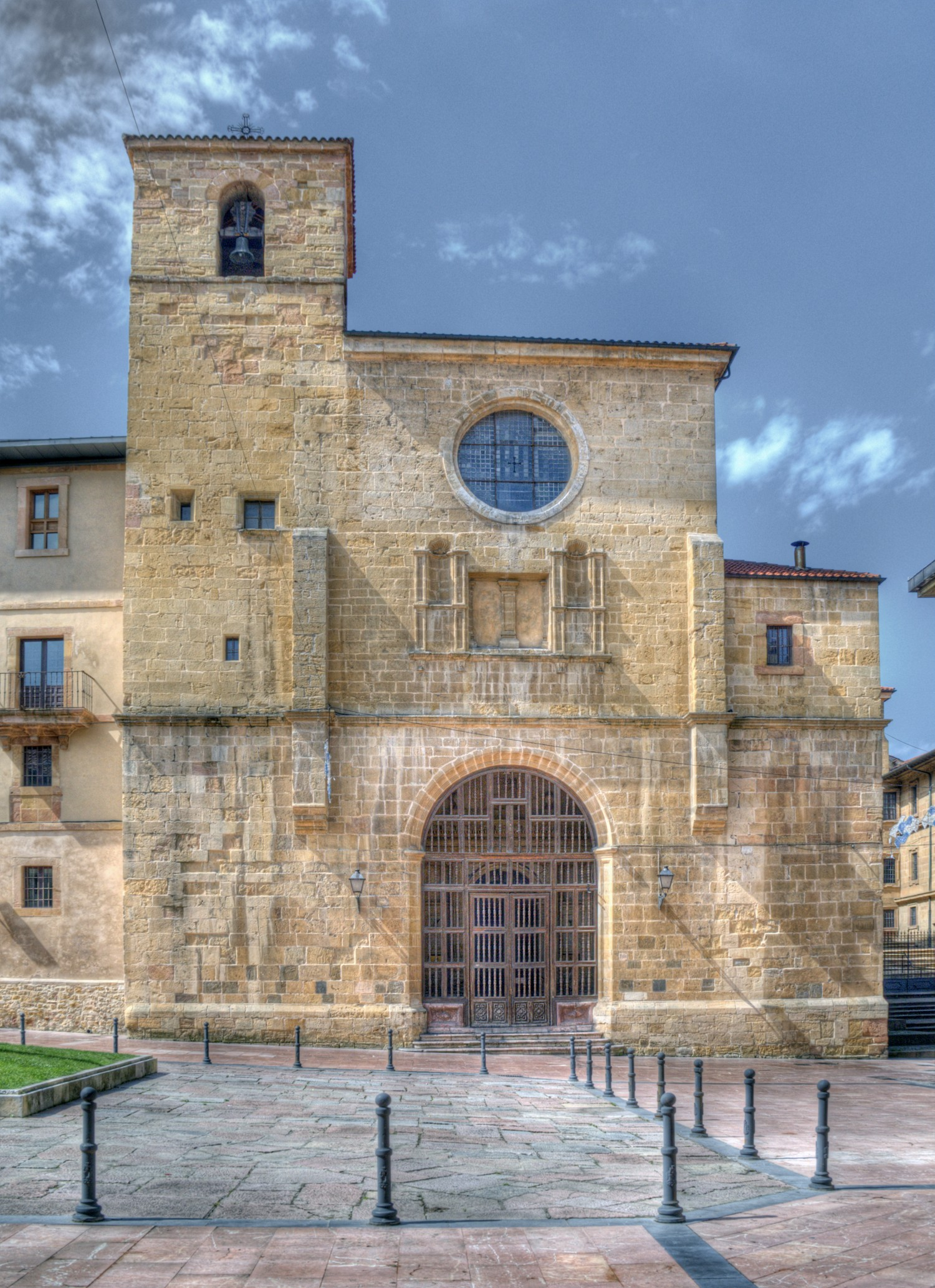 En Oviedo, en la Plaza de fray Benito Jerónimo Feijoo.